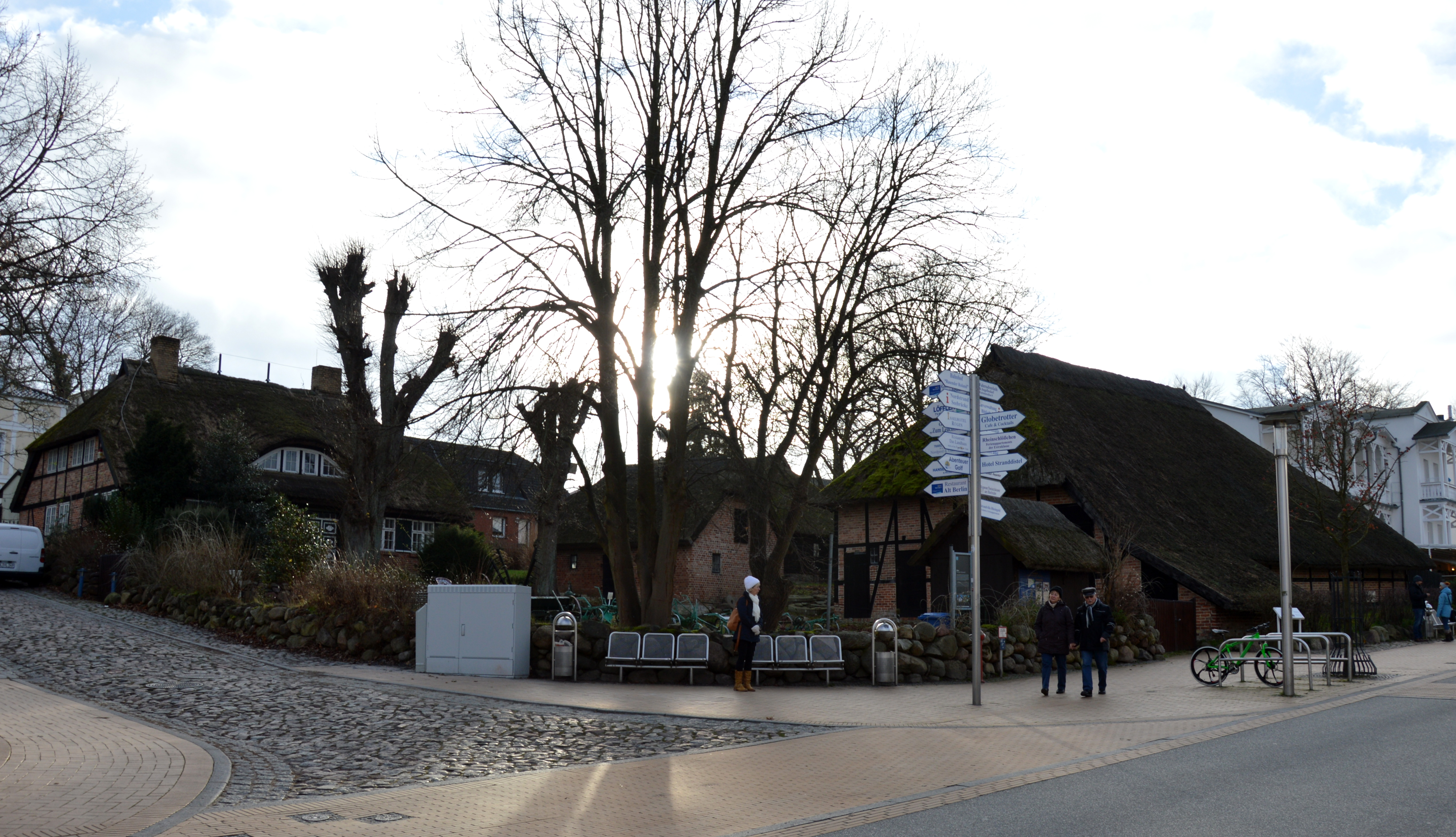 Museumshof Mönchsgut 2017